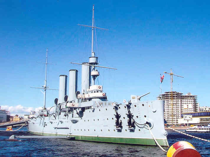 Aurora